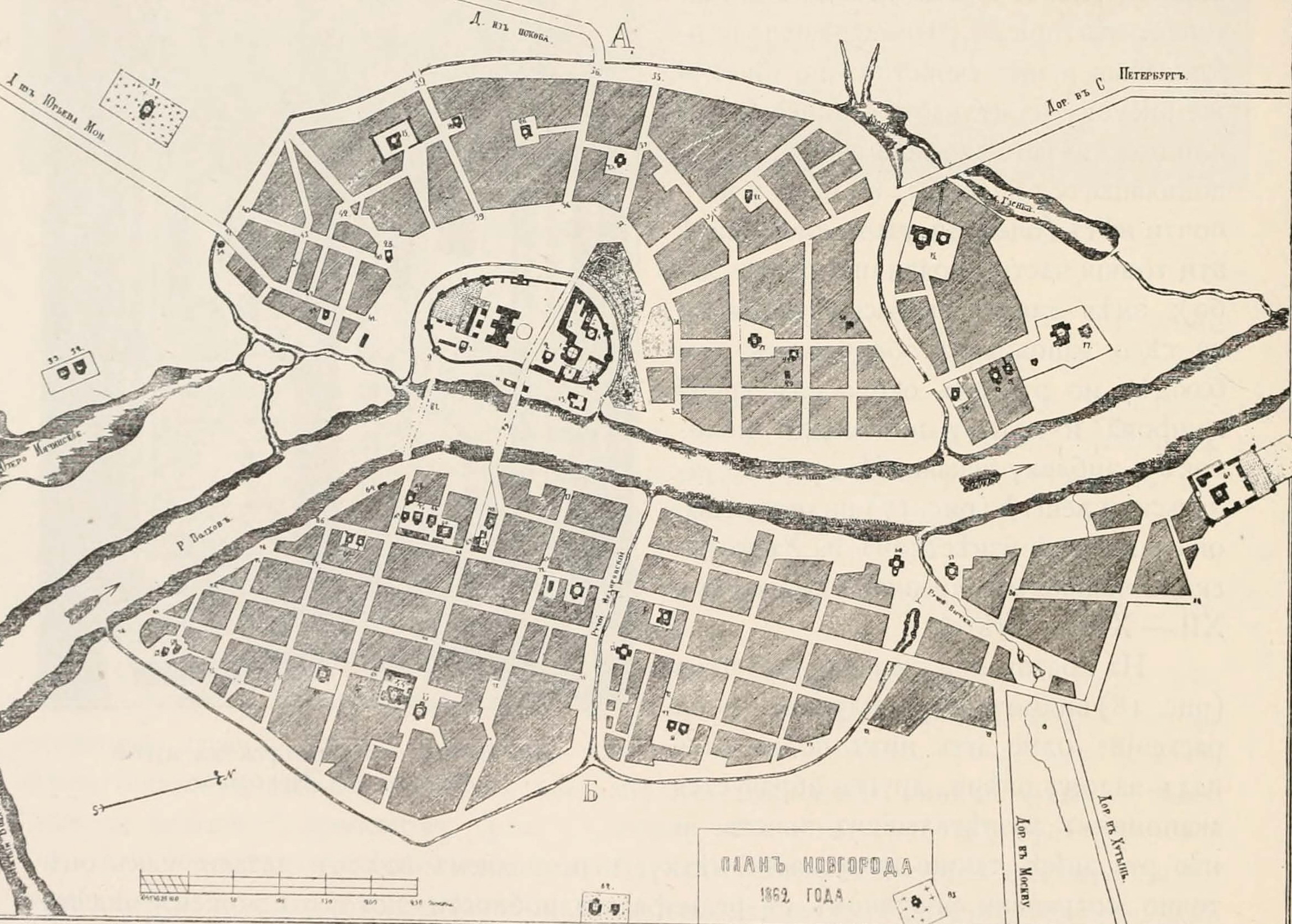 План Новгорода 1862 года